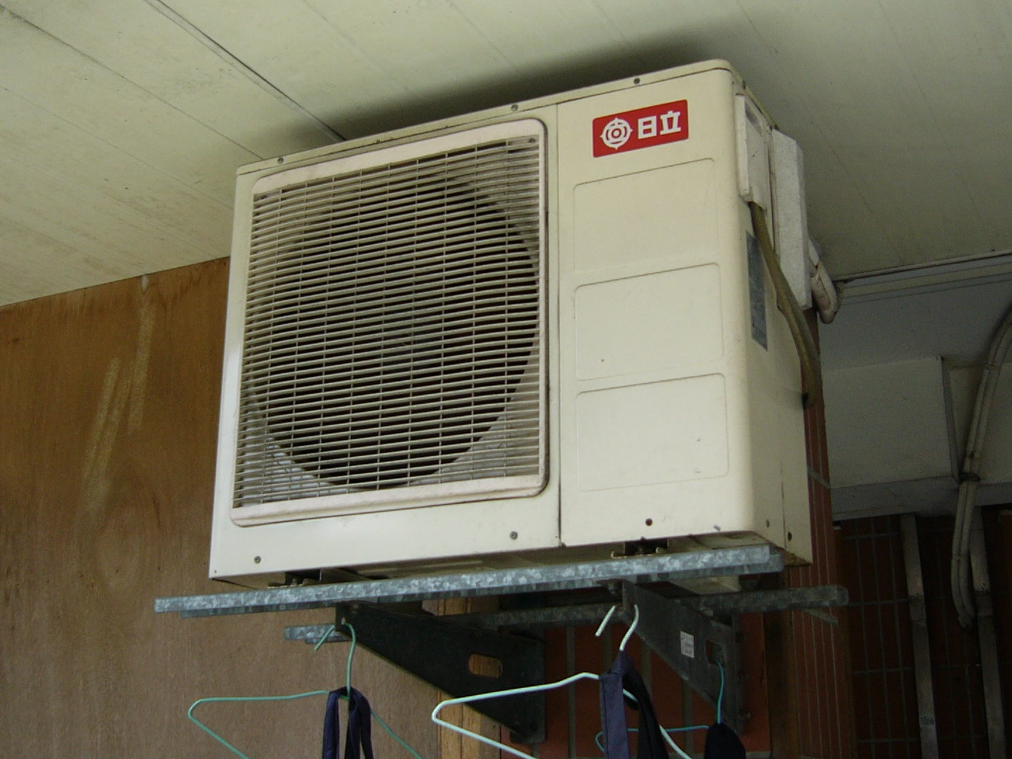 台灣日立分離式冷氣室外機外觀